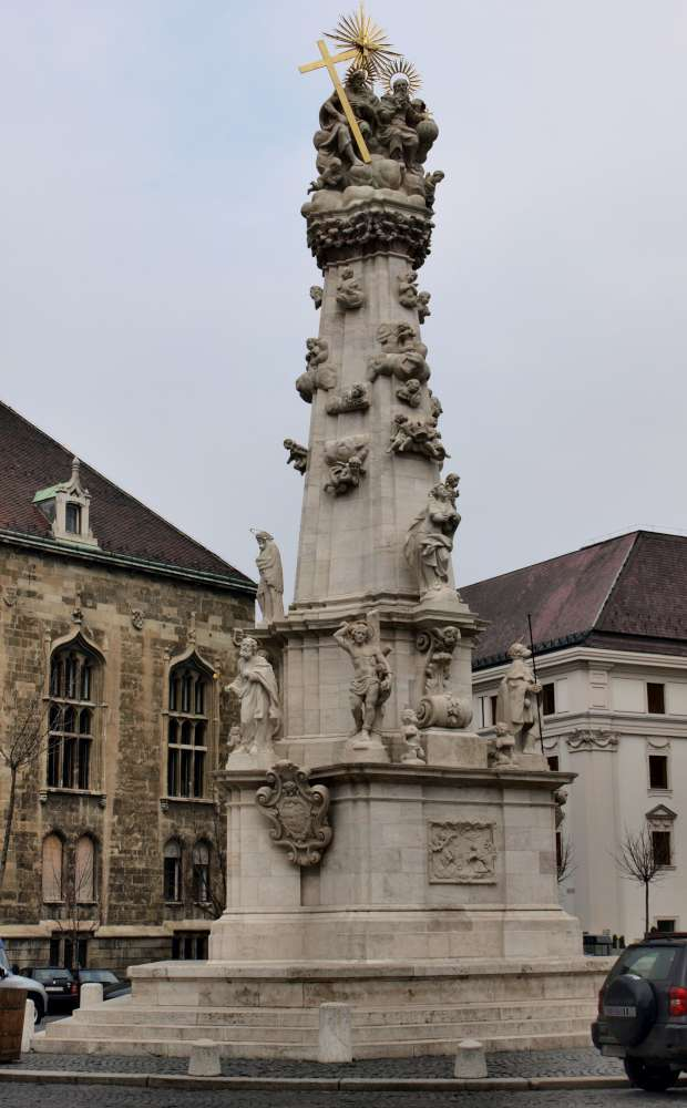 Szentháromság-szobor (Budapest, I. ker., Szentháromság tér)